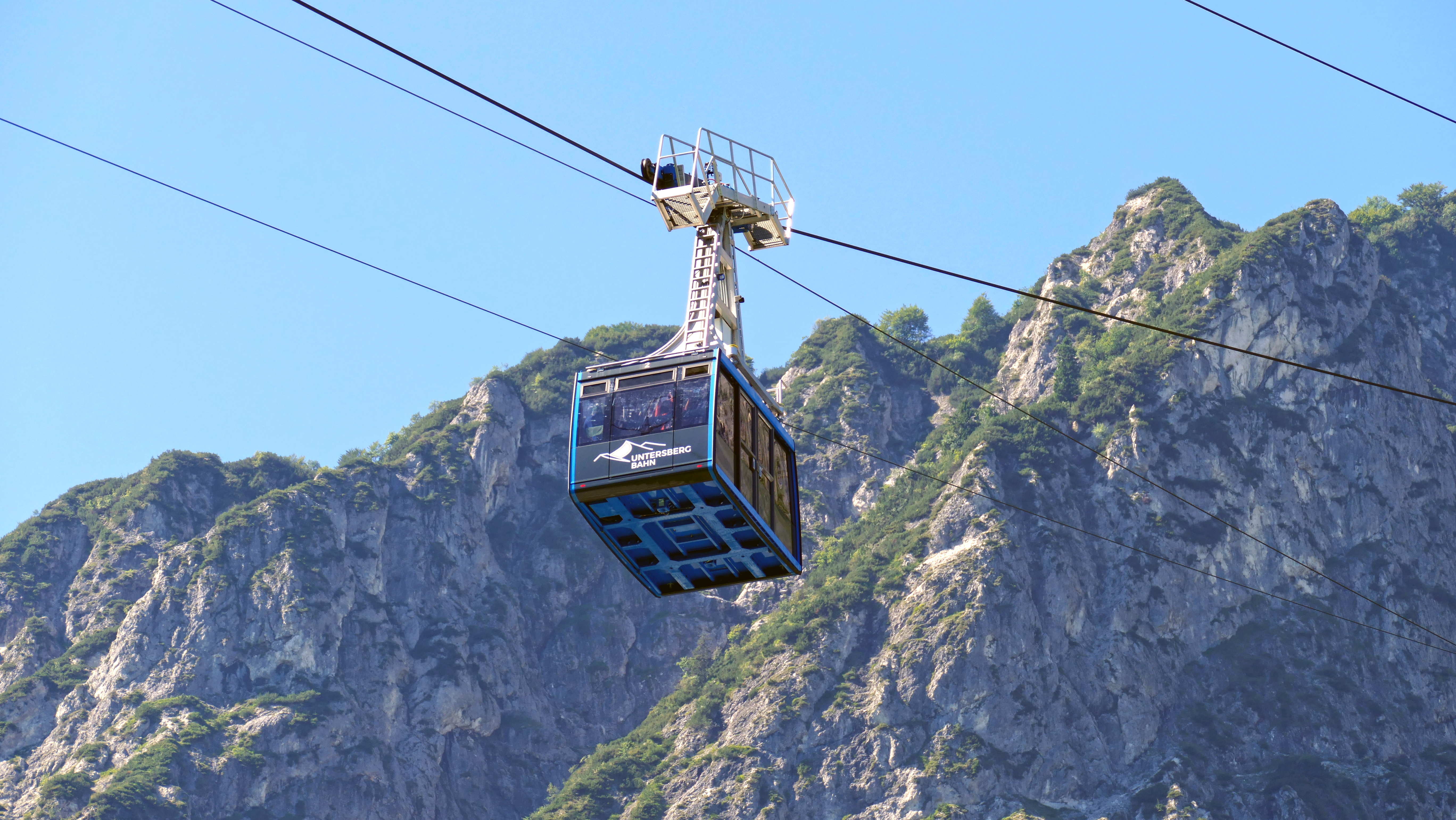 Gondel Nr 2 der Untersbergbahn in Grödig, Österreich